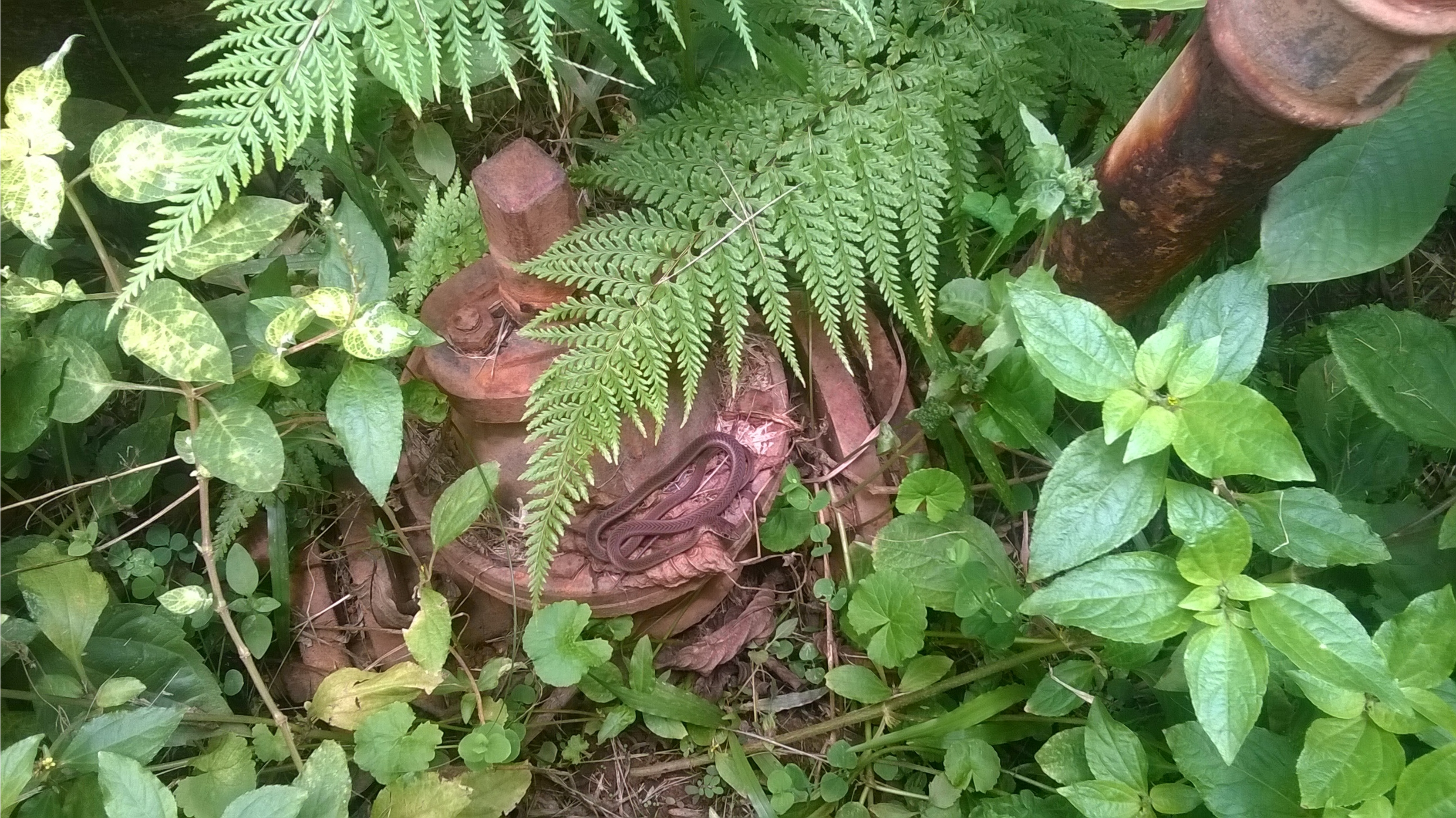 Serpent qui prend du soleil